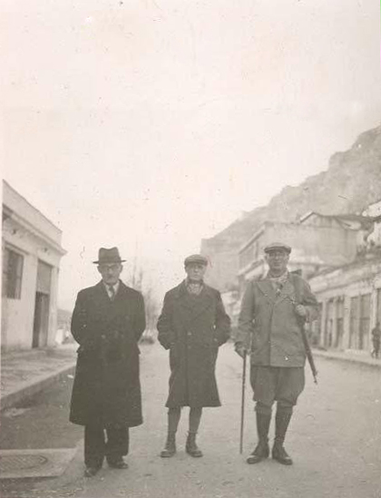 Balli Kombëtar leaders Ali Këlçyra, Mit'hat Frashëri, Thoma Orollogaj (from left to right) in Berat